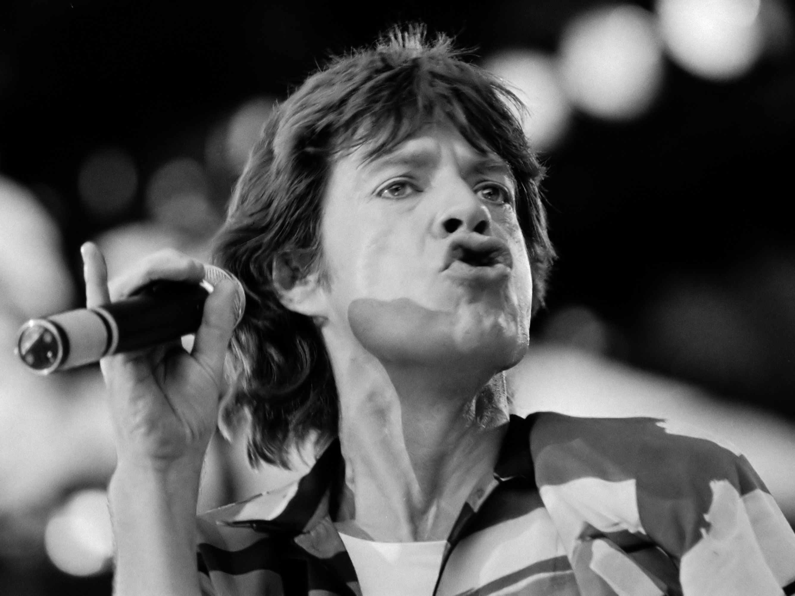 Optreden Rolling Stones in het Feijenoordstadion, Rotterdam; Mick Jagger , kop 2 juni 1982